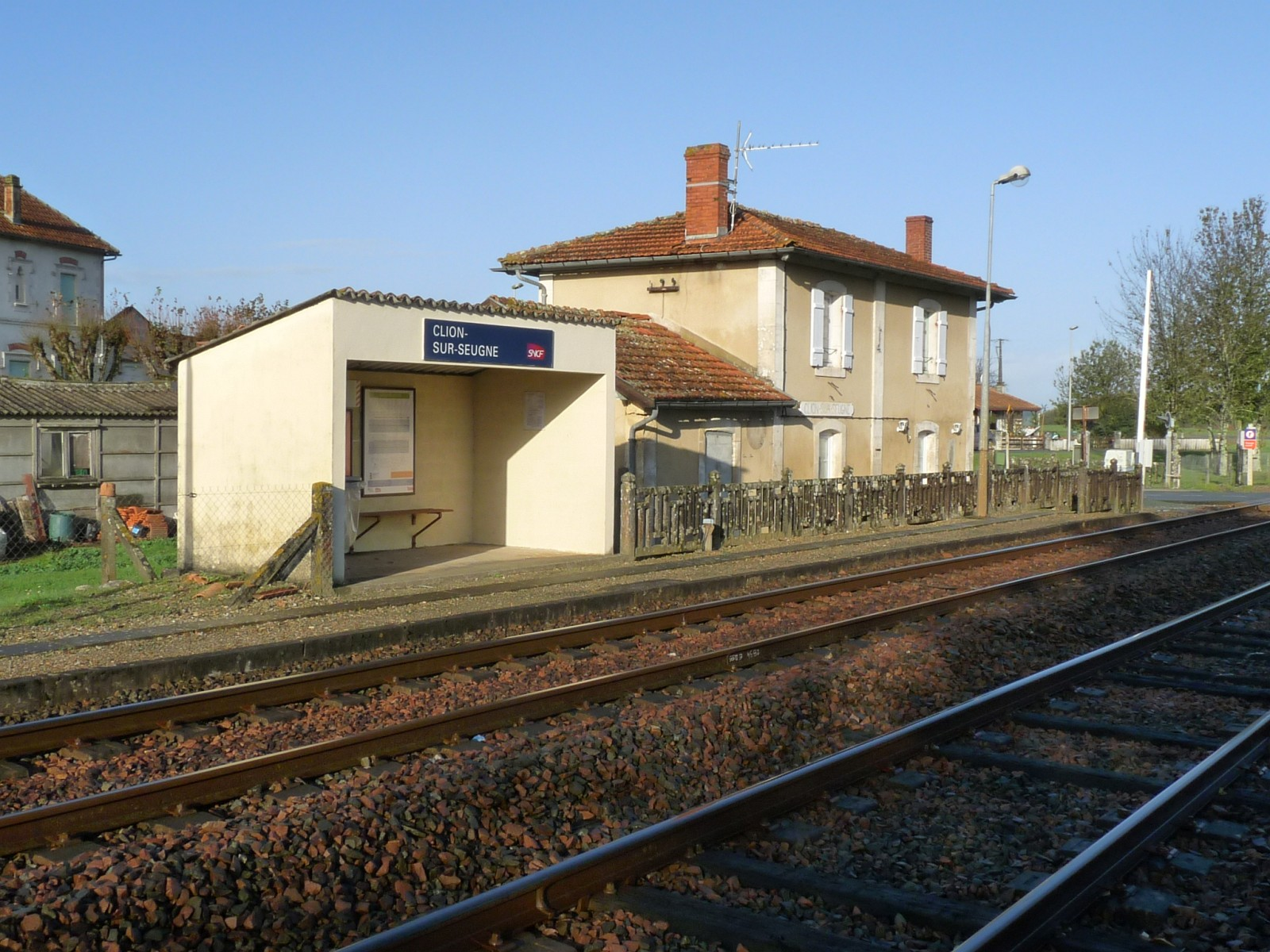 Gare de Clion, Charente-Maritime, France